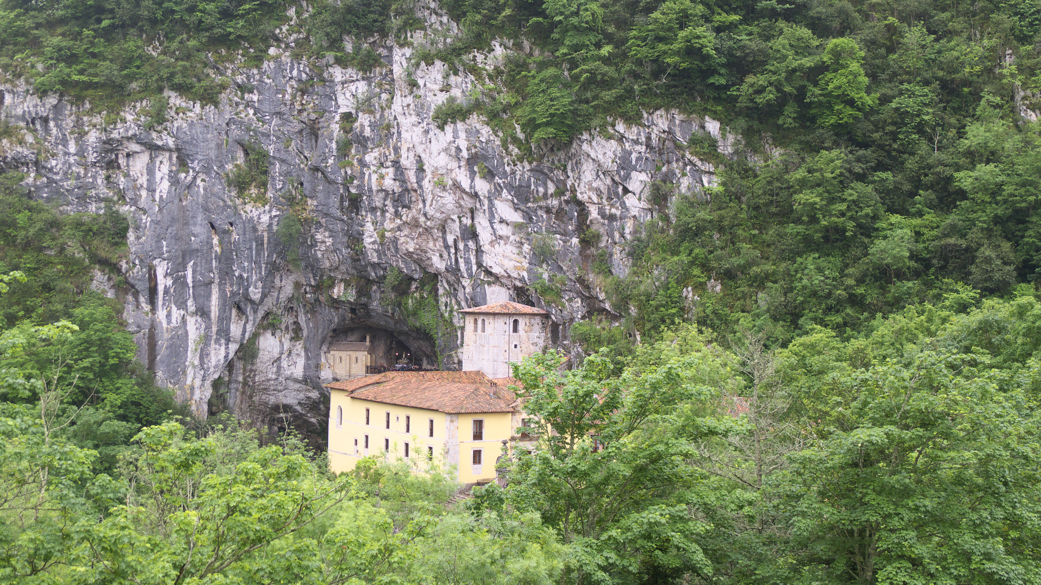 En este sitio existió el monasterio benedictino de Santa María. La construcción actual es de principios del siglo XVII.